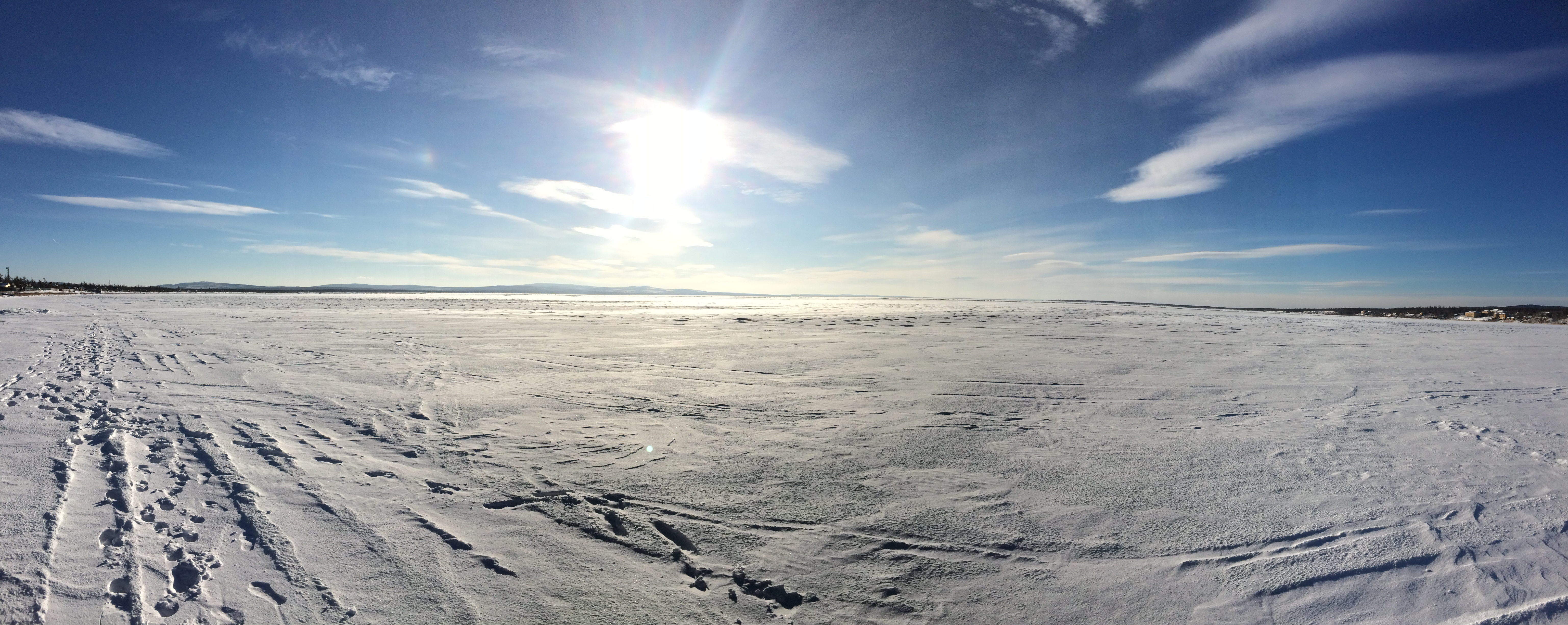 Зимняя панорама озера Арахлей (Забайкальский Край)